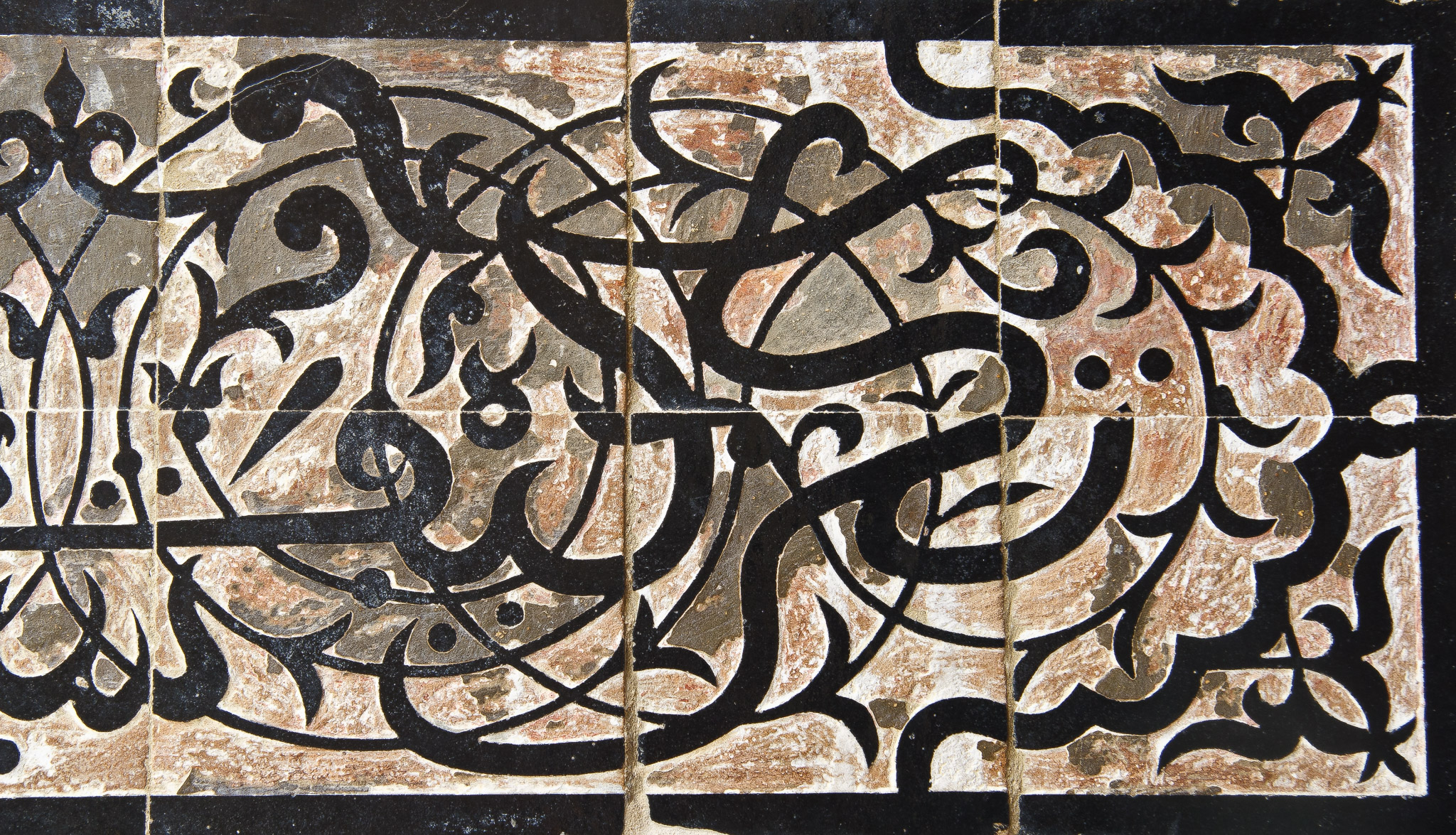 Medersa Bou Inania